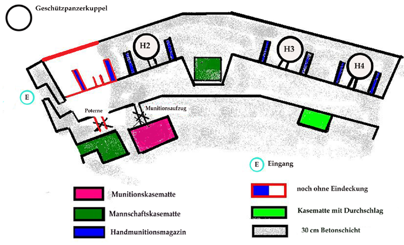 Grundriss Forte Campomolon